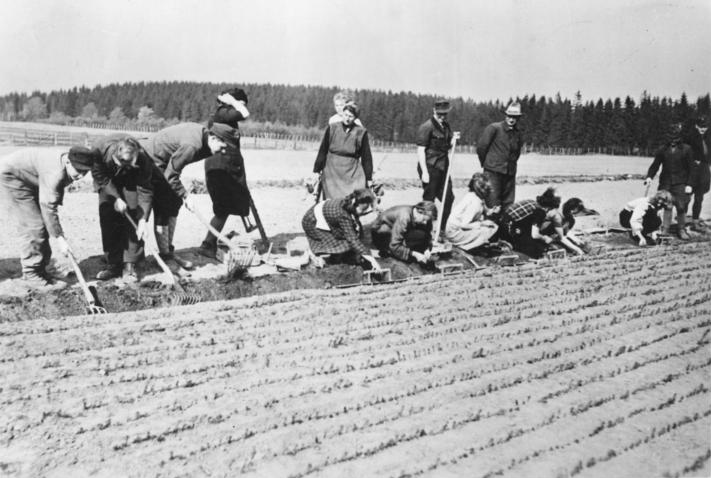 Baumschule, Anpflanzen einer Schonung ZB-Wille-2.10.1951 Aufforstung sämtlicher Kahlflächen in der DDR im Fünfjahresplan. Durch eine planvolle Aufforstungstätigkeit mit Beginn des 2. Jahresplanes durch Erweiterungen der Forstgärten und Forstbaumschulen wurden die Voraussetzungen geschaffen, im Gebiert unserer Republik Aufforstungen solchen Umfanges vorzunehmen, wie sie bisher in der deutschen Forstwirtschaft nicht vorgekommen sind. Ein Aufforstungschwerpunkt ist der Oberharz. UBz: 2 Jahre bleiben die aus der Saat hervorgegangenen Pflanzen im Saatbeet stehen, dann werden sie in ein anderes Beet (Verschulbeet) angefplanzt. Damit sich kräftige Pflanzen mit einem gut gebildeten Wurzelsystem entwickeln, erhalten die Pflanzen im Verschulbeet einen grösseren Standraum (Arbeiterbrigade beim Verschulen).